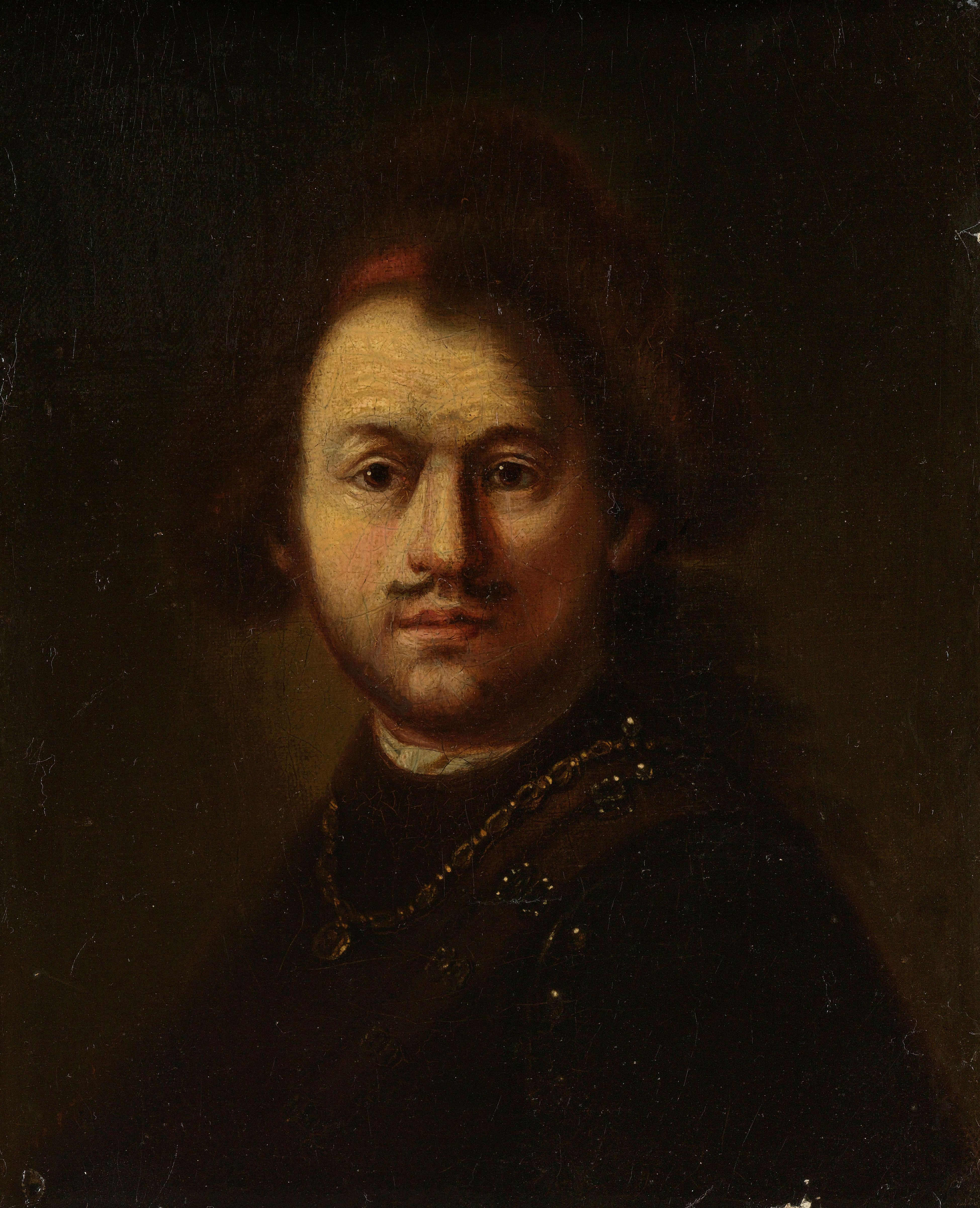 Buste van een man, het gelaat en face, een keten om de hals.